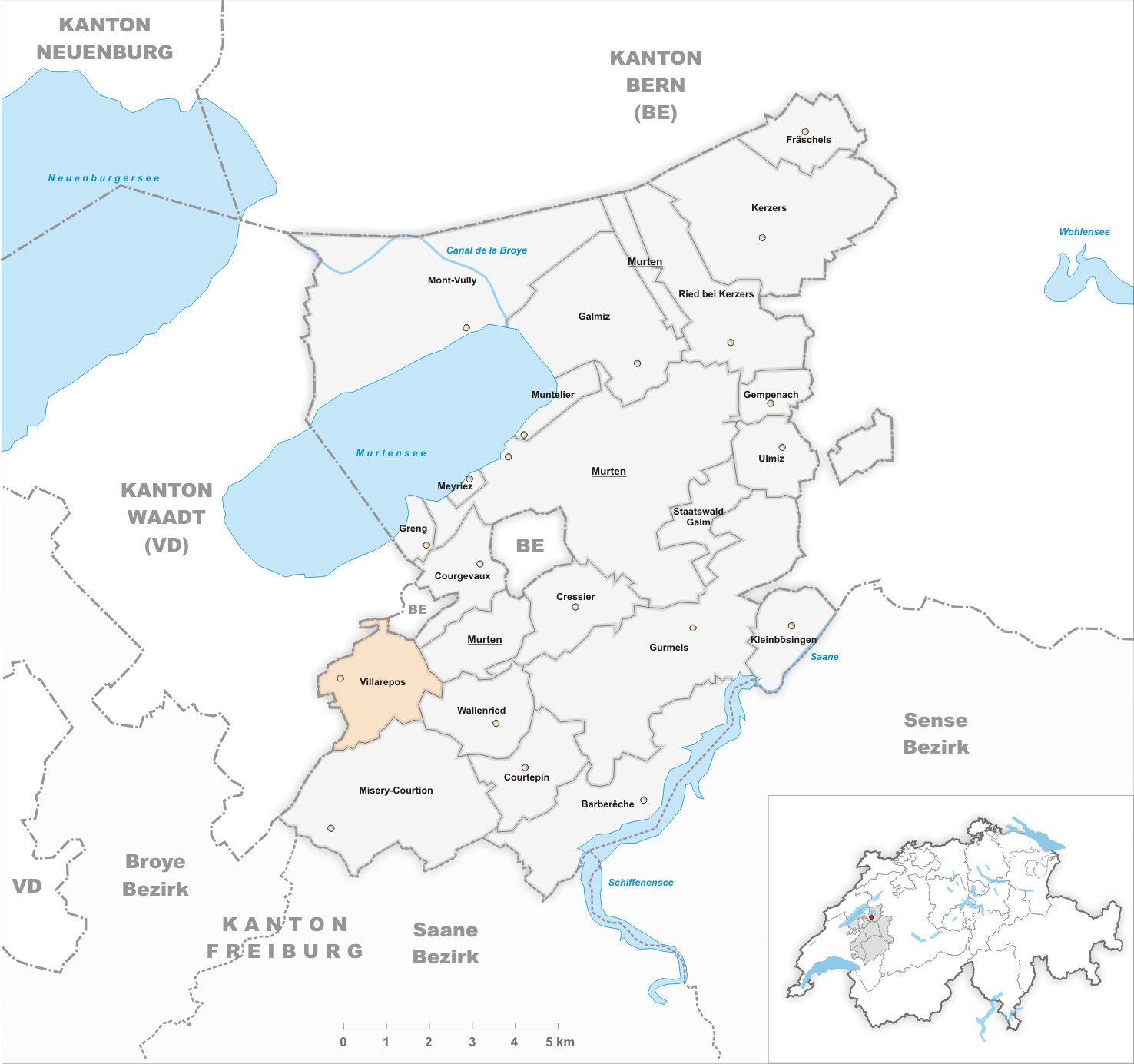 Municipality Villarepos